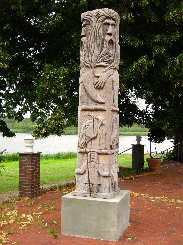 Viergesichtige neuzeitliche Statue des Svantevit auf der Burgwallinsel im Teterower See (Landkreis Rostock, Mecklenburg-Vorpommern). Plastik von Ralph Wedhorn